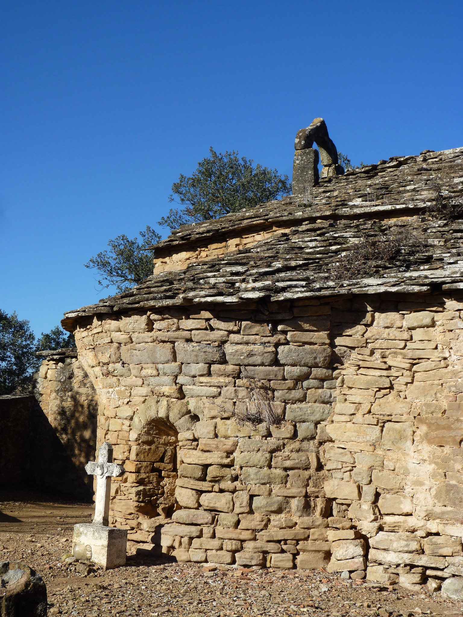 Església de Sant Joan i Sant Marc de Batlliu (Artesa de Segre)